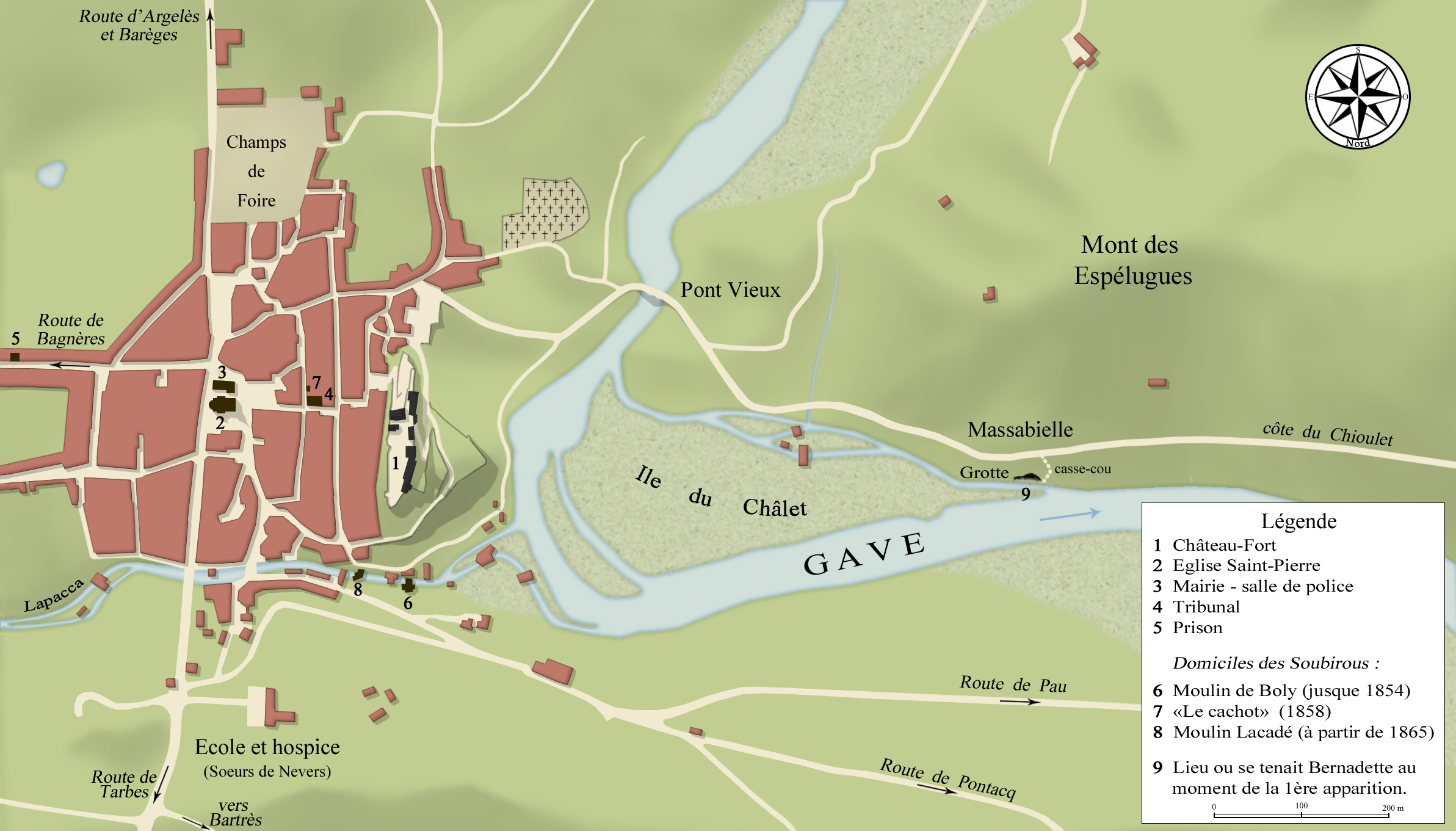 D'après : "Carte du pays de Lourdes à l'époque des Apparitions (1858)". Domaine public.